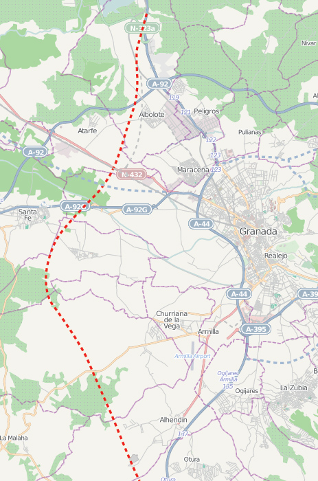 Segunda Circunvalación de Granada